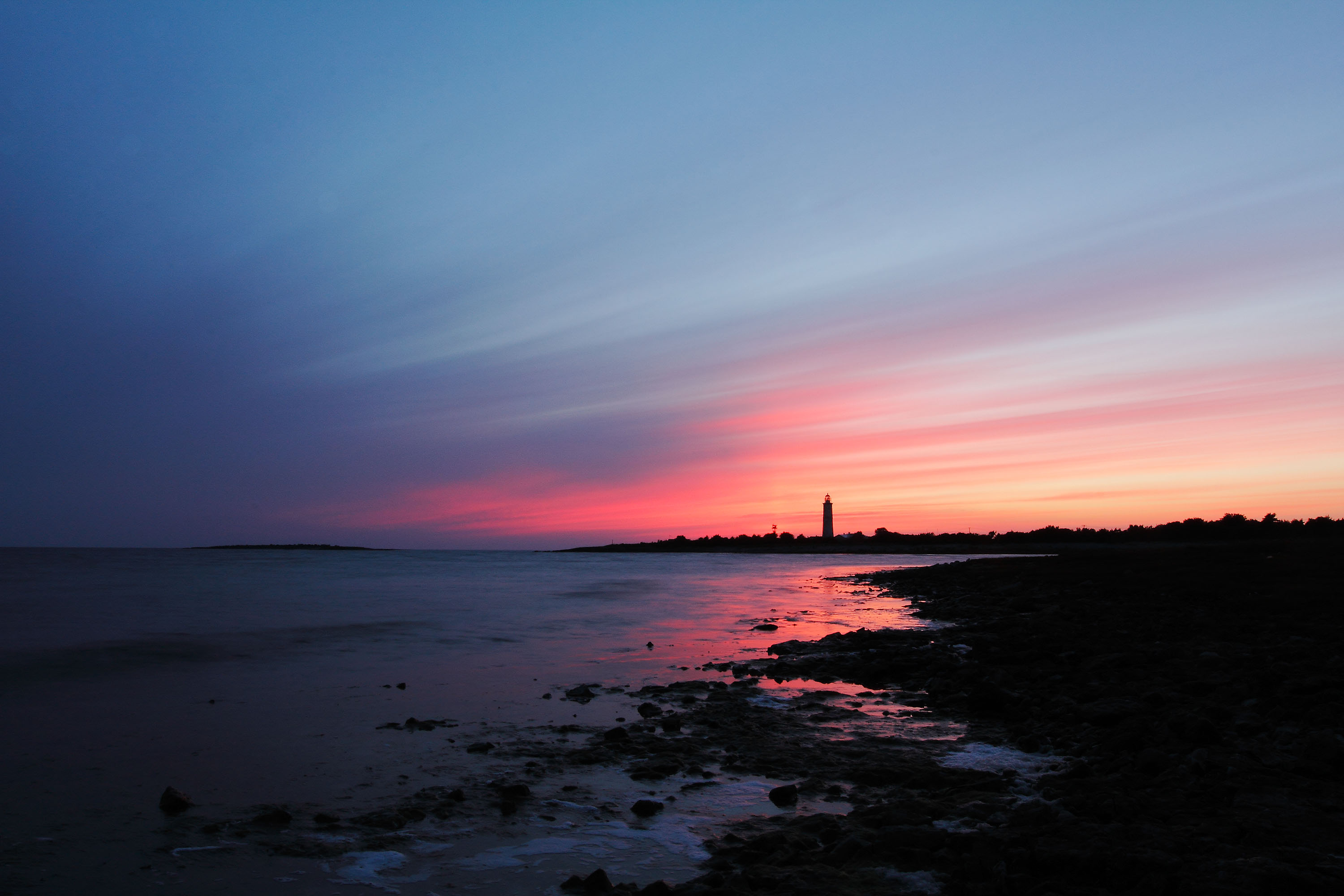 Vilsandi rahvuspark. Kaugelt paistab Vilsandi tuletorn.